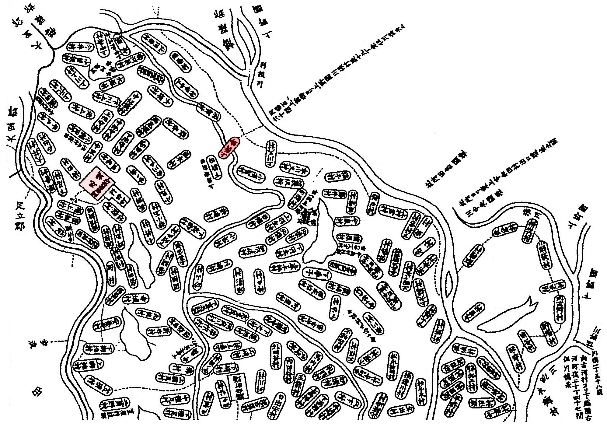 改変図、新郷村・忍城周辺。江戸時代、武蔵国葛飾郡、郡図（新編武蔵風土記稿より）。